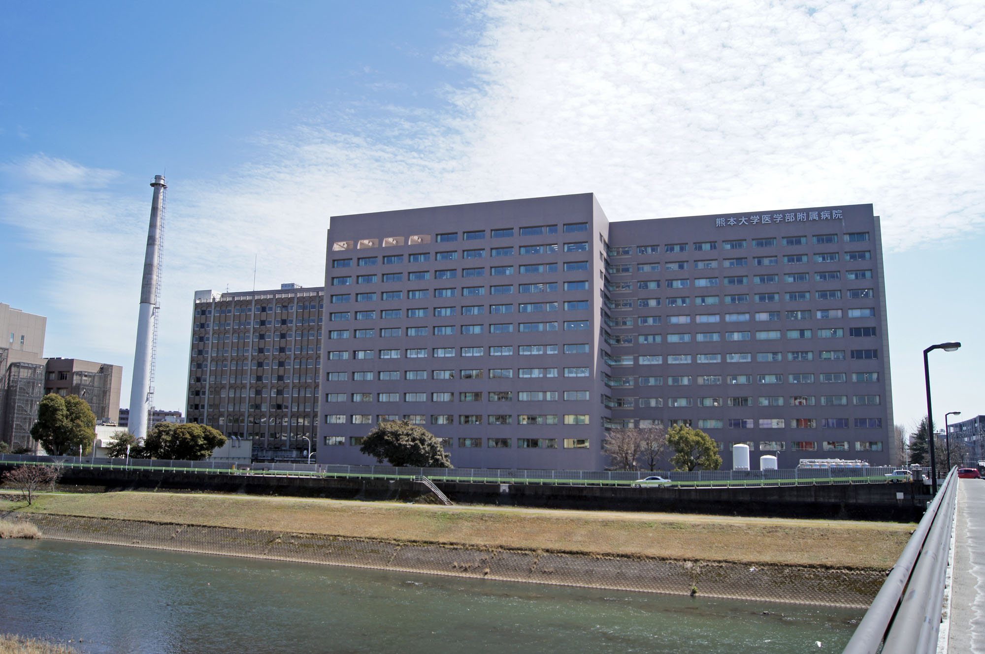 熊本大学医学部附属病院を白川方面より撮影 photoshopで修正